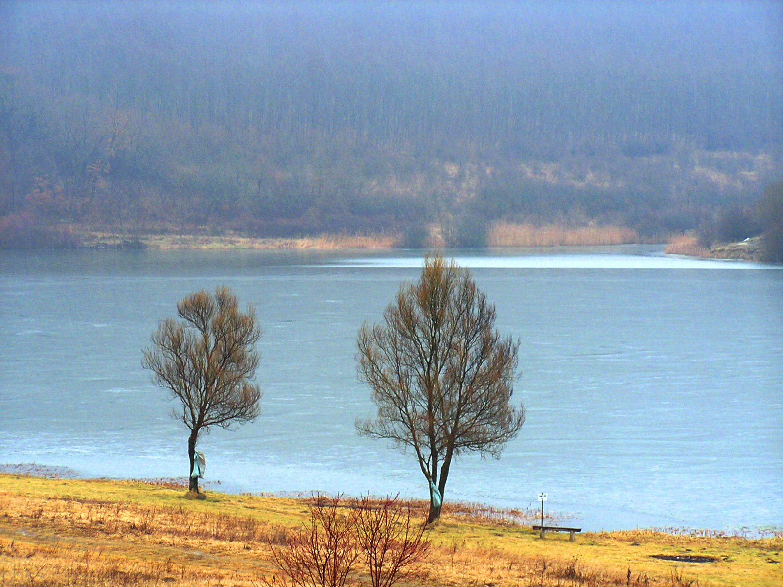 Szálka településen található tó.